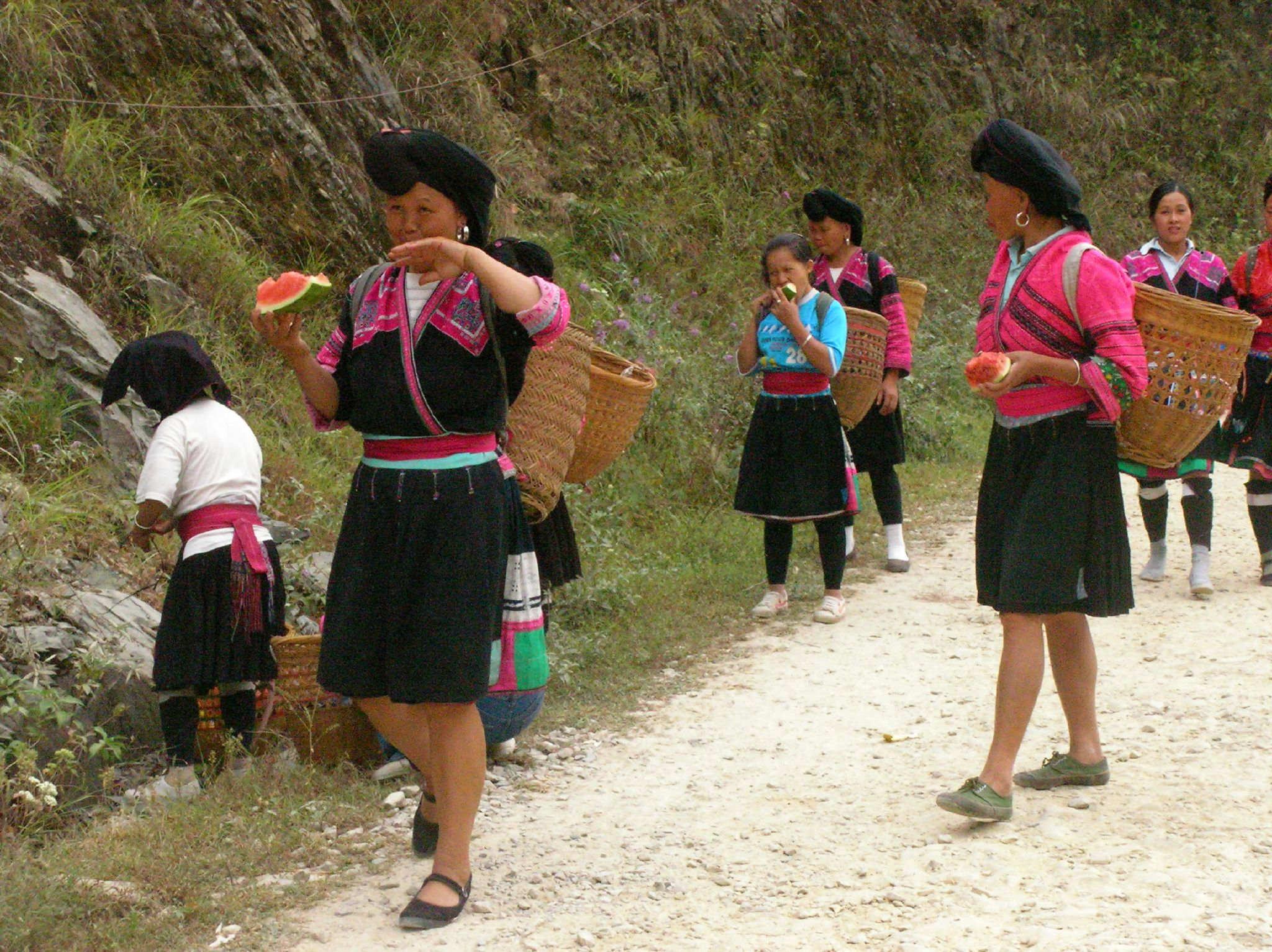 Jao moterys. ئۇيغۇرچە / Uyghurche: ياۋزۇ مىللىتى.